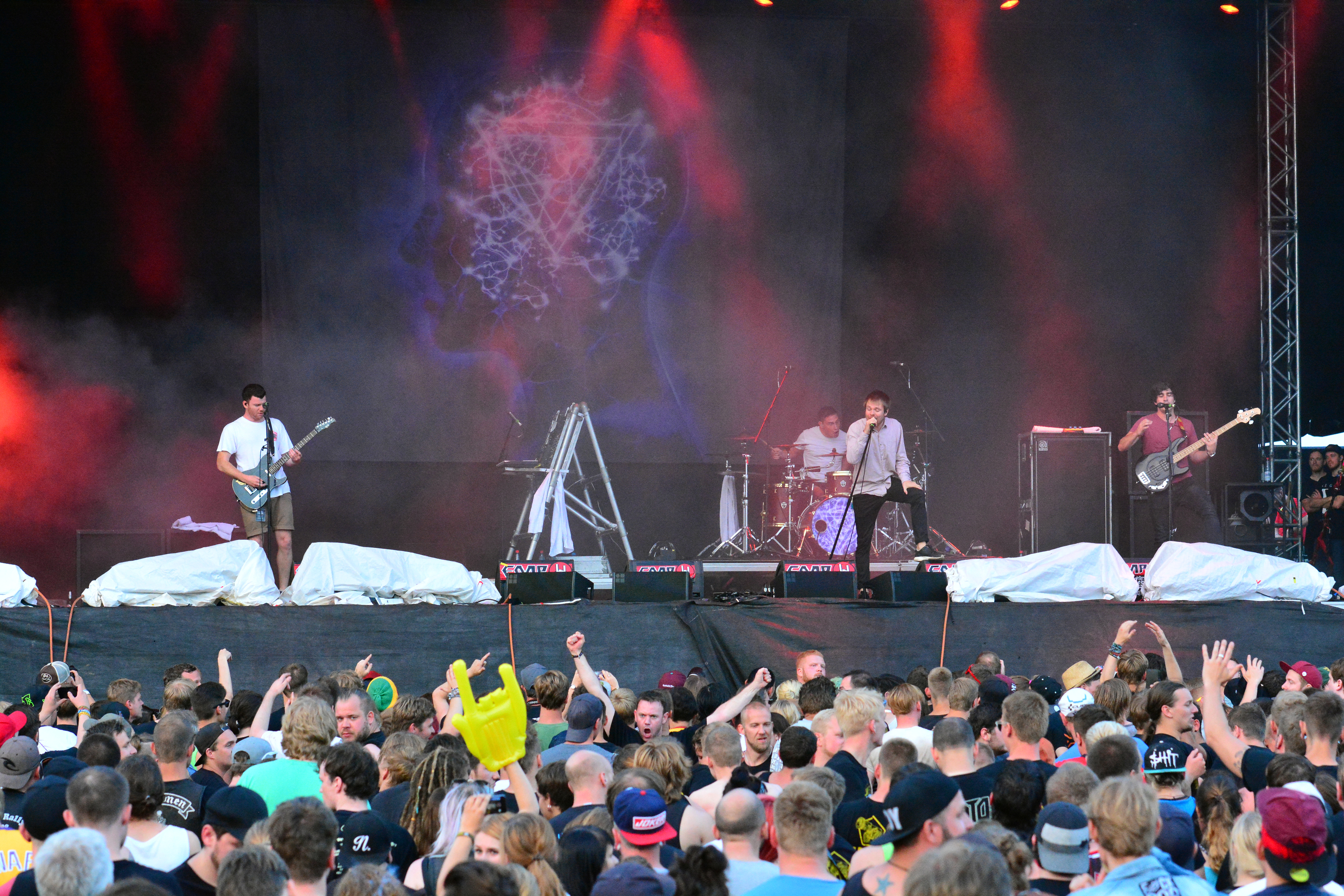 Enter Shikari beim Reload Festival 2015